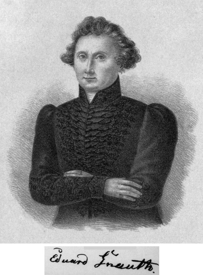 Eduard Gnauth im Theaterkostüm, Königlich Württembergischer Hof-Schauspieler. Porträt mit Unterschrift.